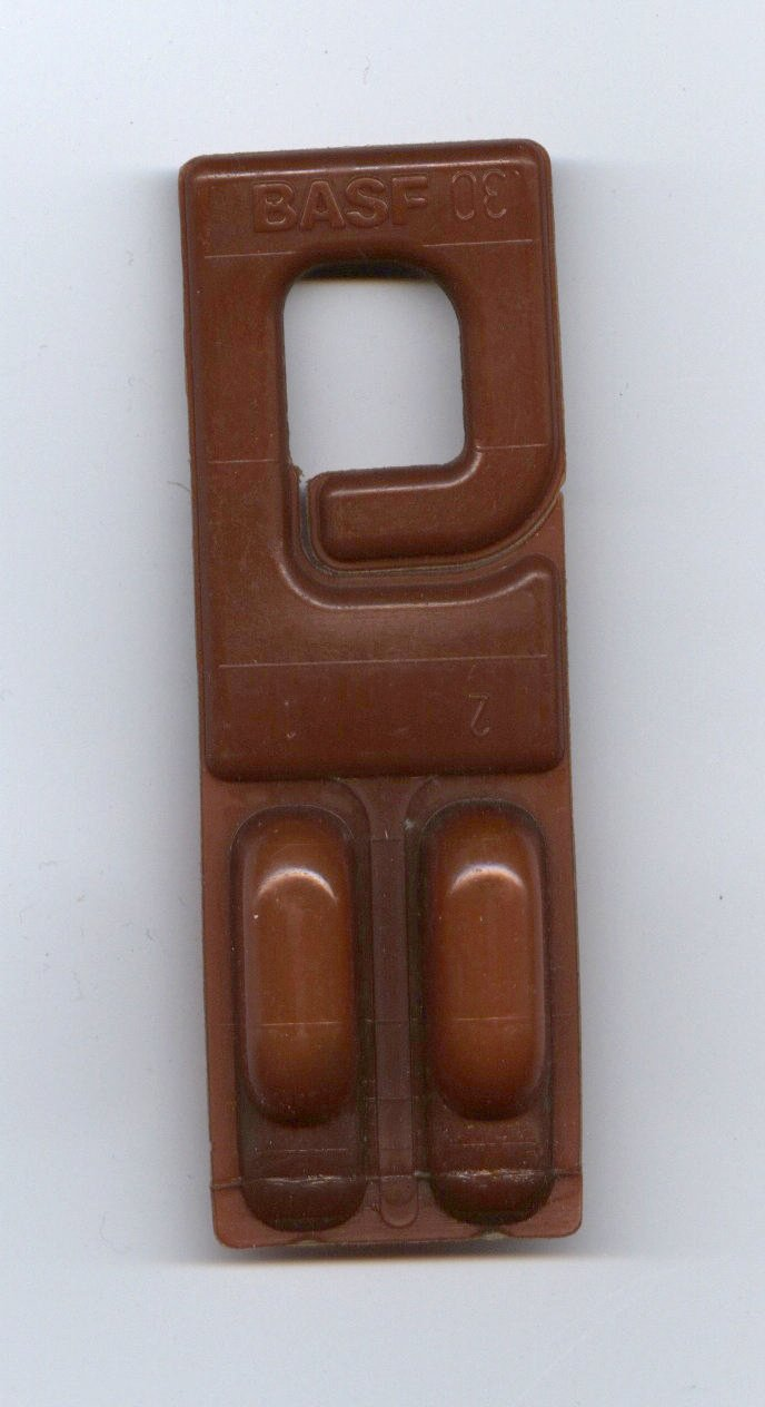 Duffuseur de phéromones dans les vignes